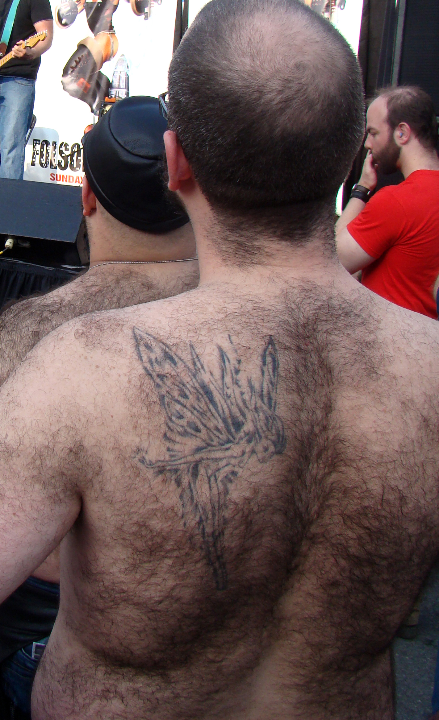 hairy fairy